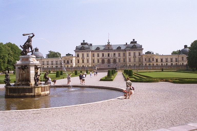 D'Schloss Drottningholm vum Park aus gesinn